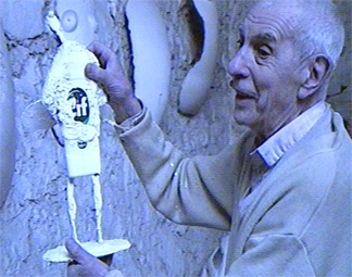 Portrait de Robert Couturier